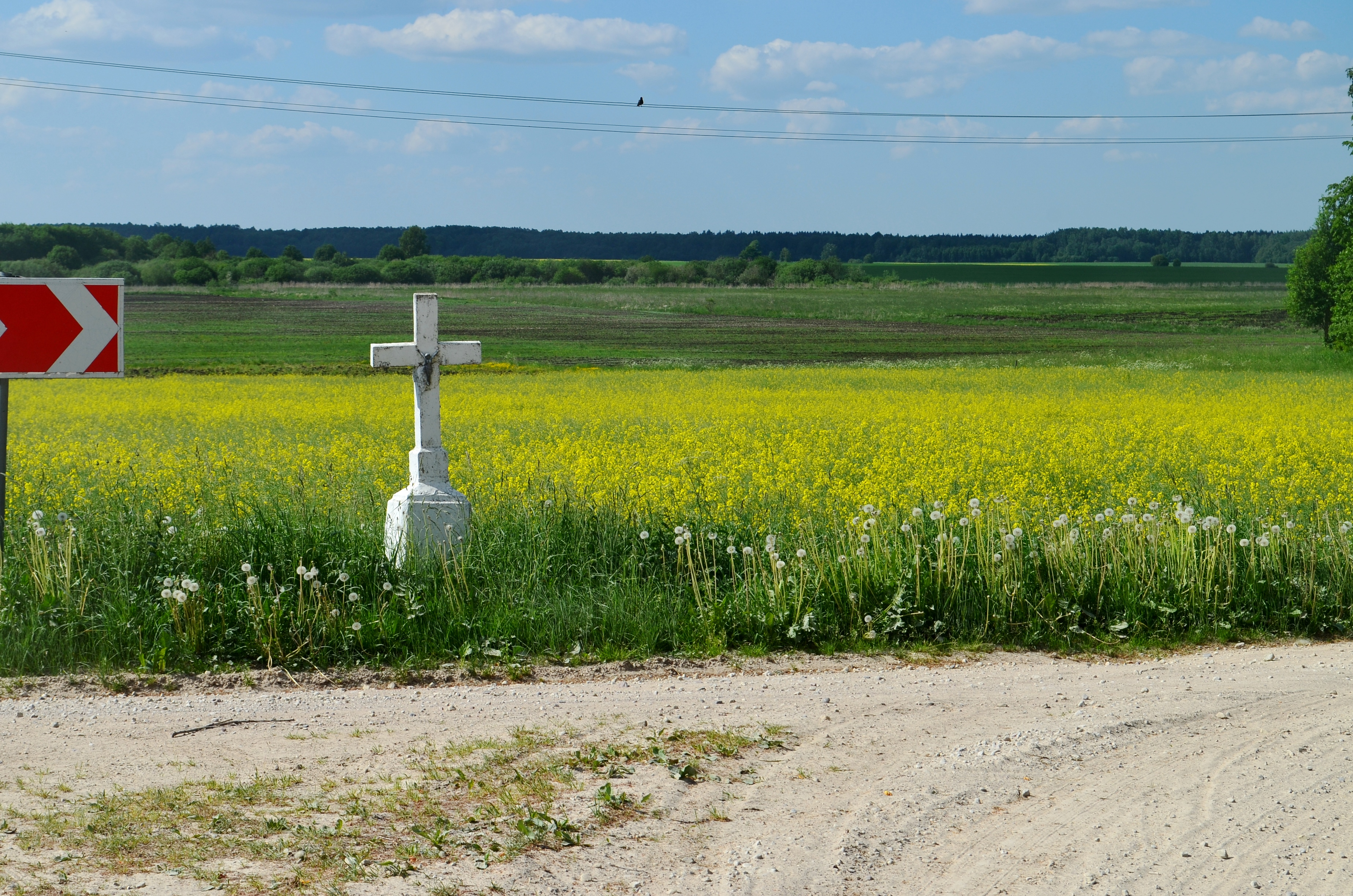 Kryžius Mimaičiuose, Šiaulių raj.